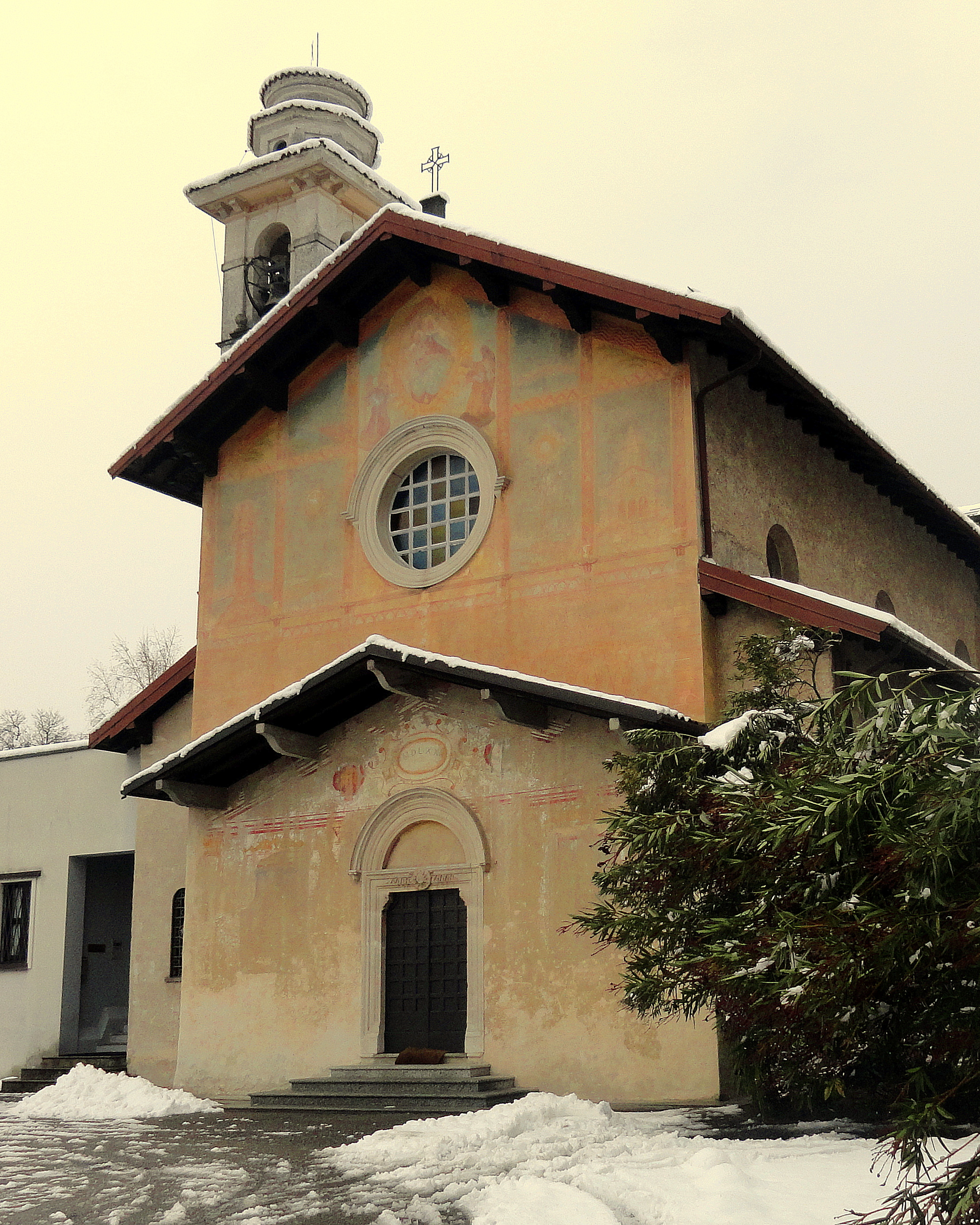 Questo è il santuario di Santa Maria del Sasso , a Caravate (VA), in Italia. Questa chiesa è dedicata all'Assunzione di Maria ed è gestita da P. Passionisti.